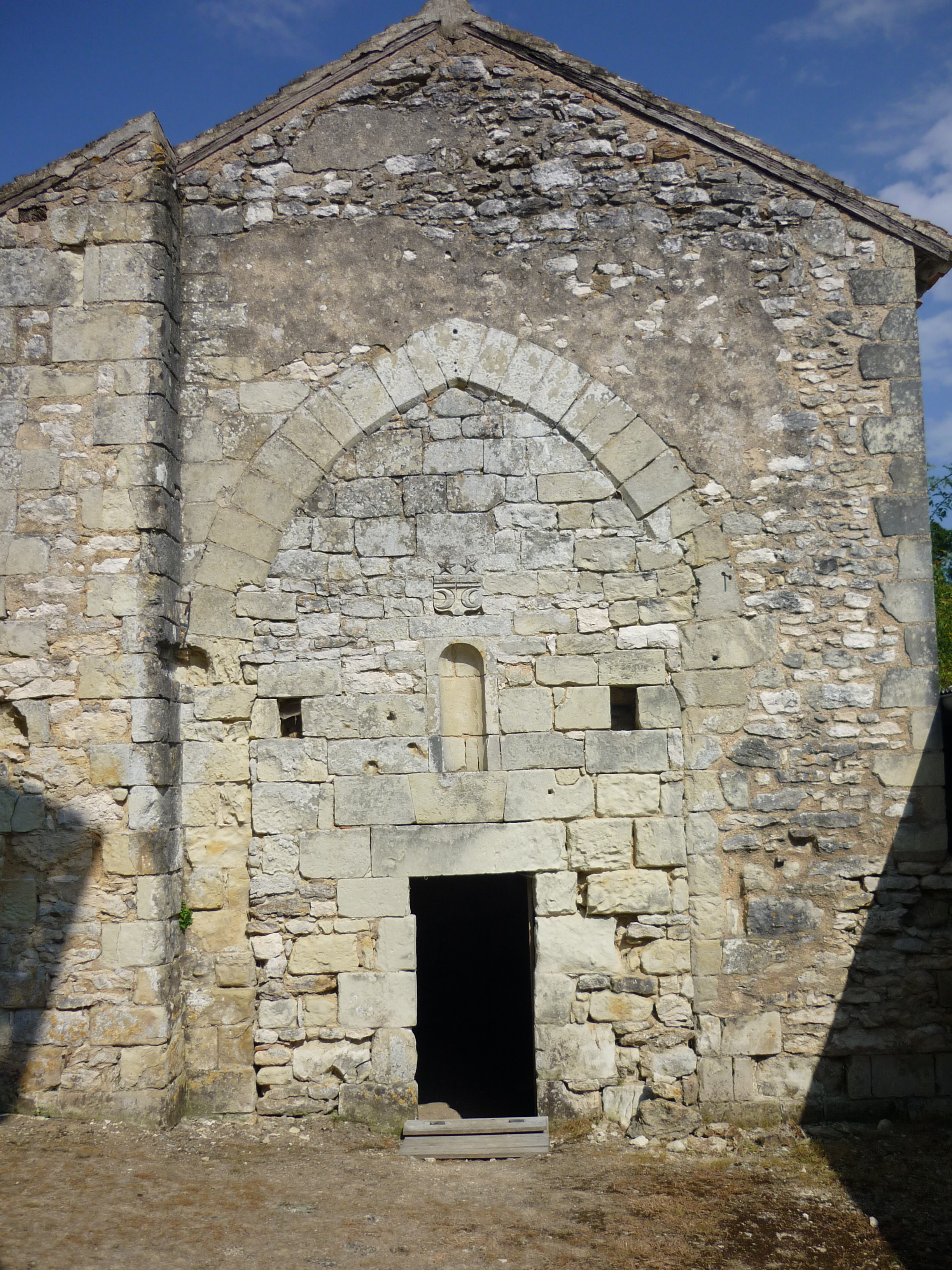 Kloster L'Étoile, Kapelle am ehem. südlichen Querhausarm